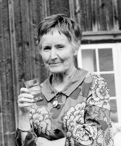 Willy Maria Lundberg framför Träslottet 1 augusti 1966 This file was derived from: Willy Maria Lundberg och Carl Malmsten 1966.jpg